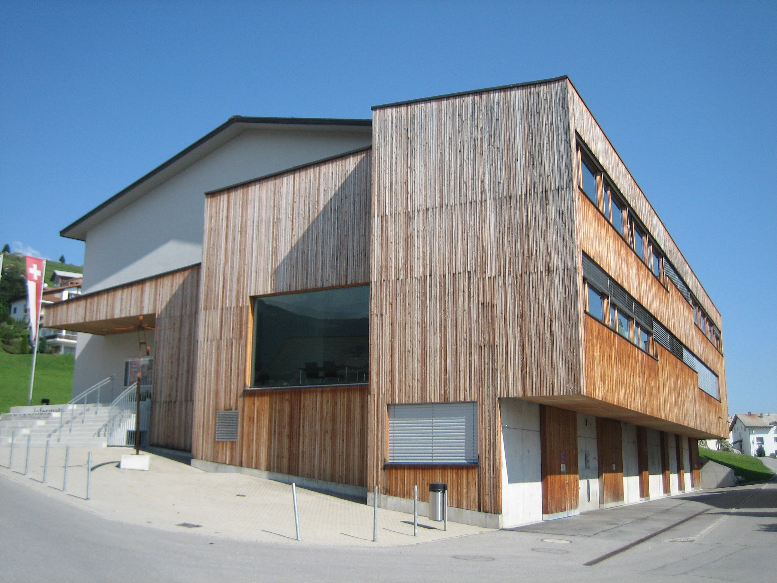 Falera: Kulturzentrum La Fermata